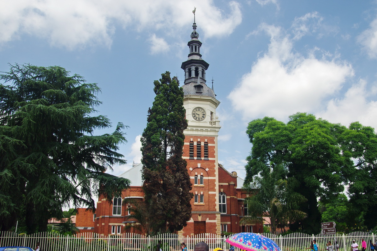 Gereformeerde Kerk gegenüber Krugerhaus Pretoria